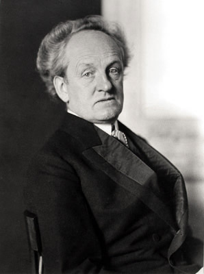 Portrait of Gerhart Hauptmann (1862–1946), 1905